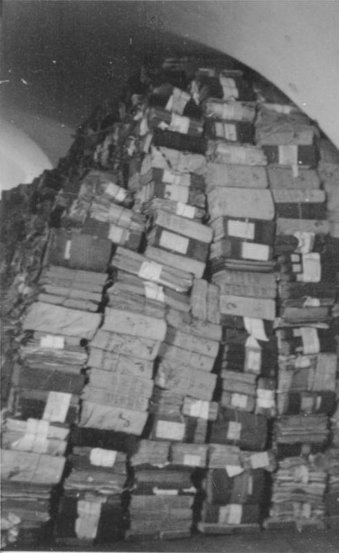 Smolensk Sichergestelltes Smolensker Archivmaterial Juni 1943 Film 89/11